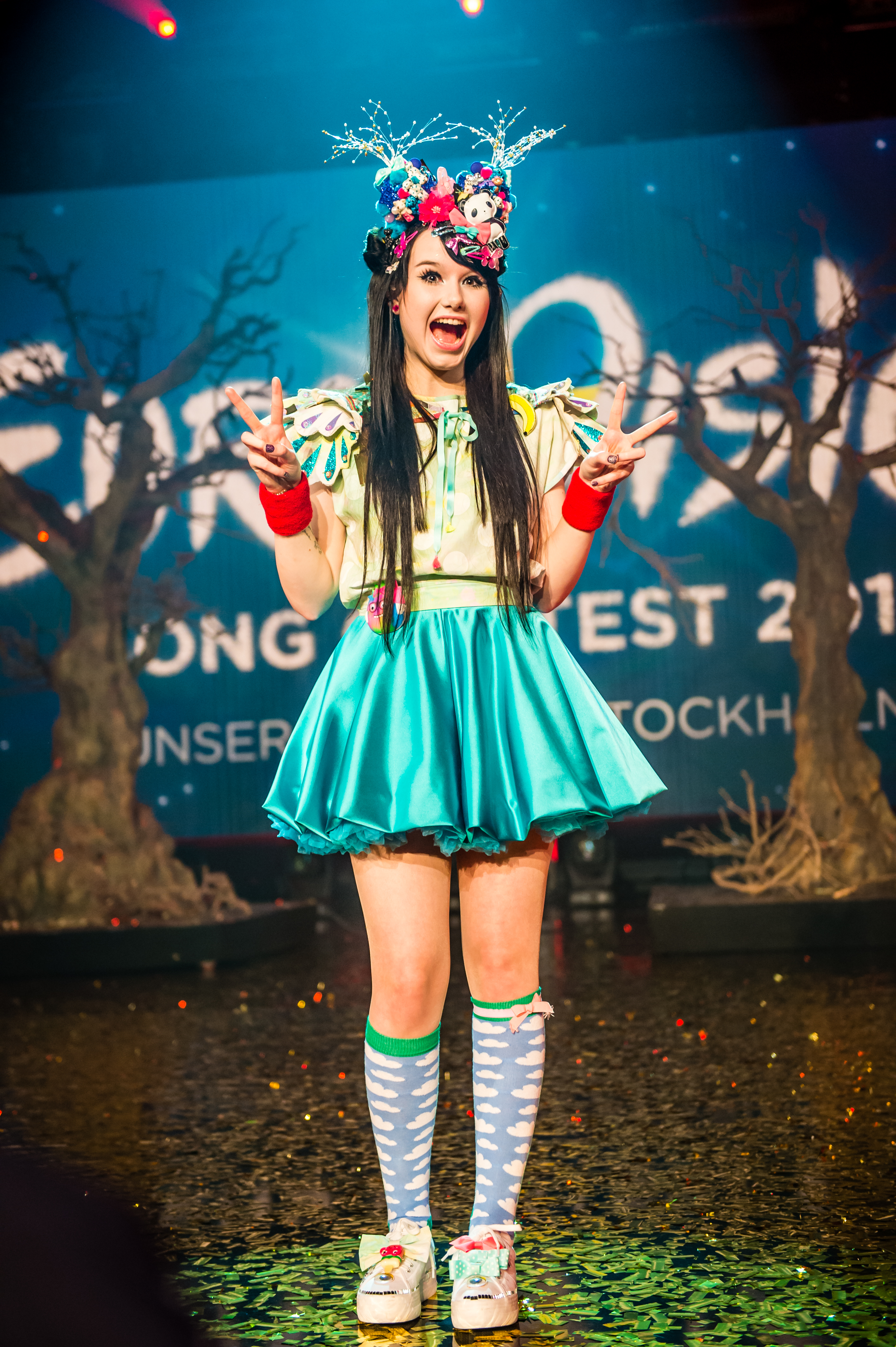 Eurovision Song Contest 2016 - Unser Lied für Stockholm - Jamie-Lee Kriewitz